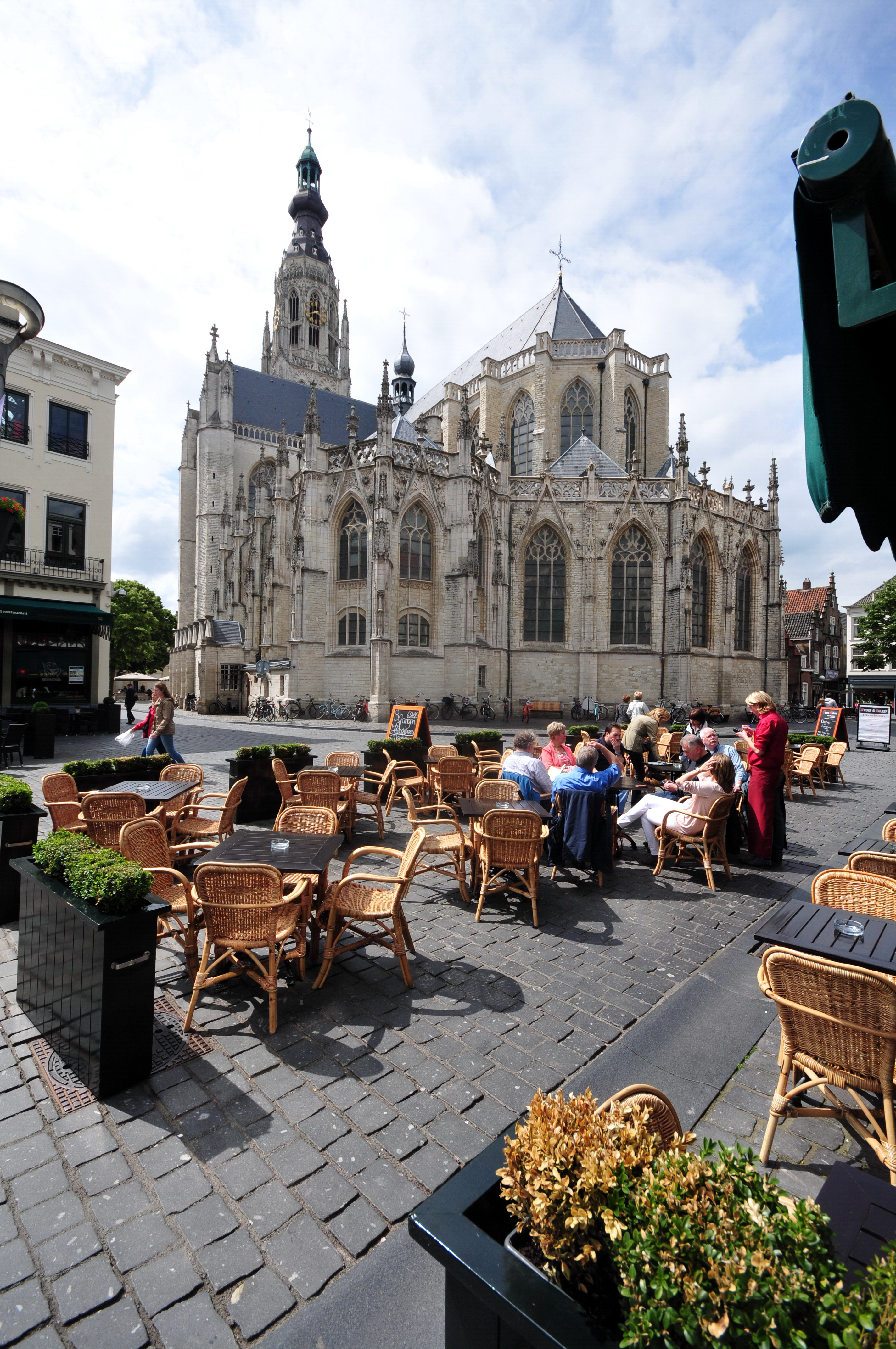 Breda, Niederlande, 2013